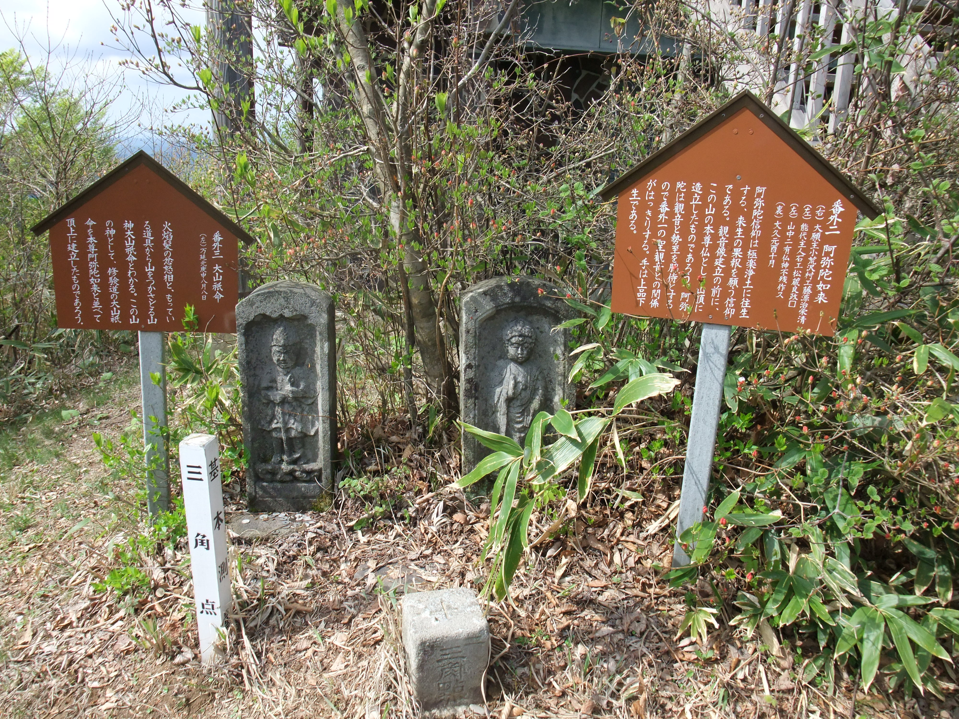 房住山山頂にある三角点と奉納された石仏